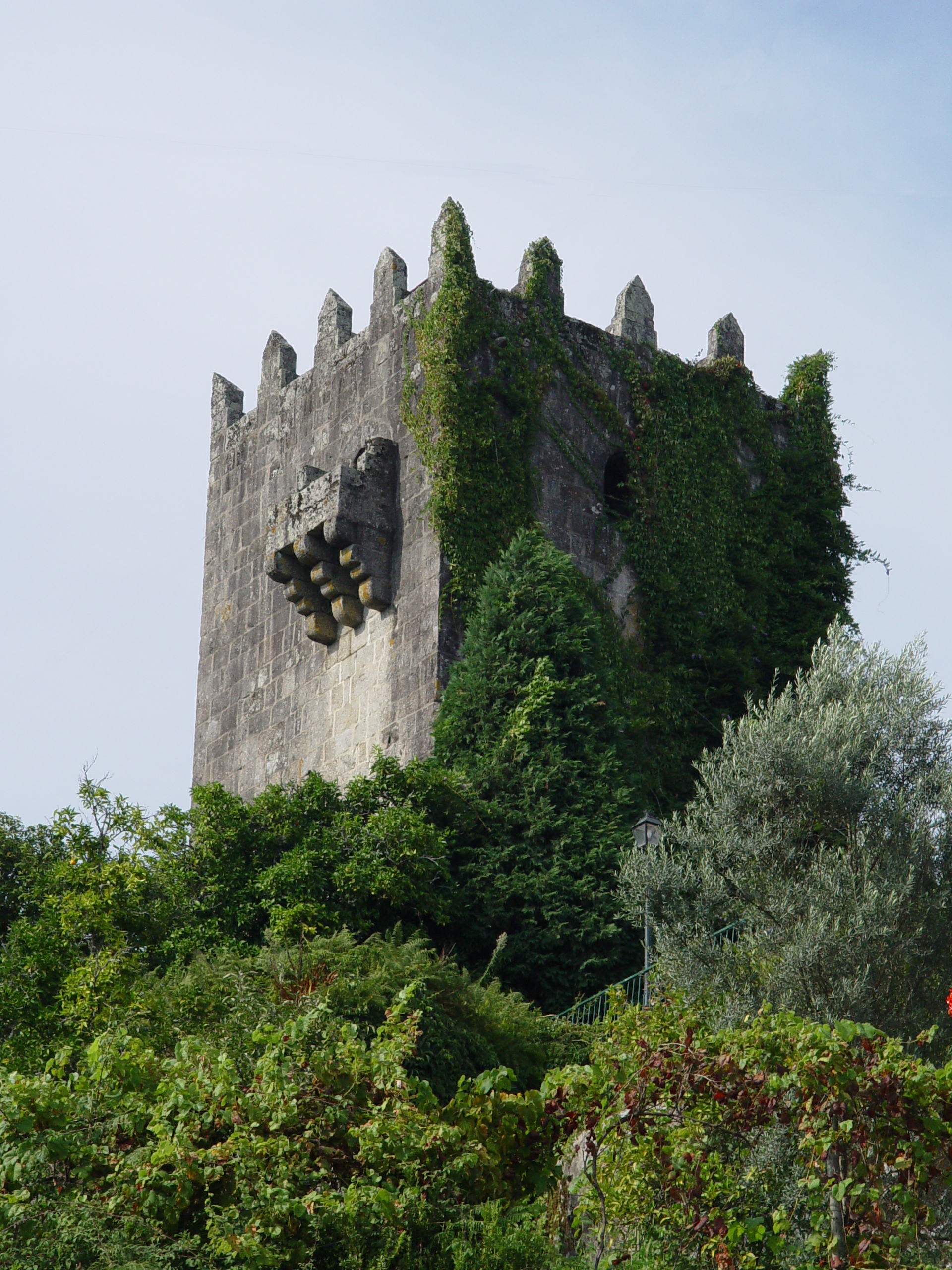 Penegate tower in São Miguel de Carreiras, Portugal